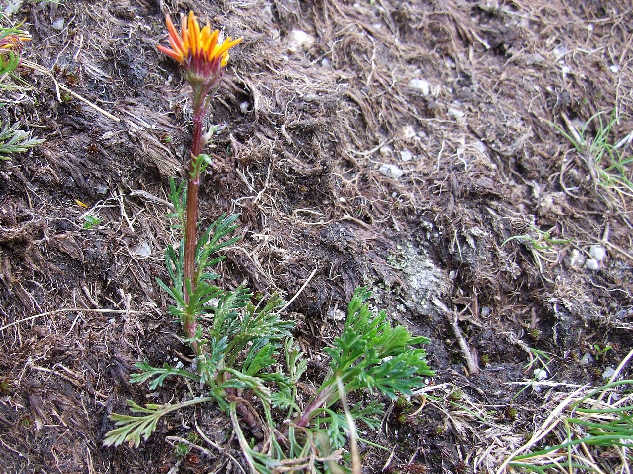 Senecio carpaticus (habitat:Tatra Mountains, Rakuska Przełęcz)